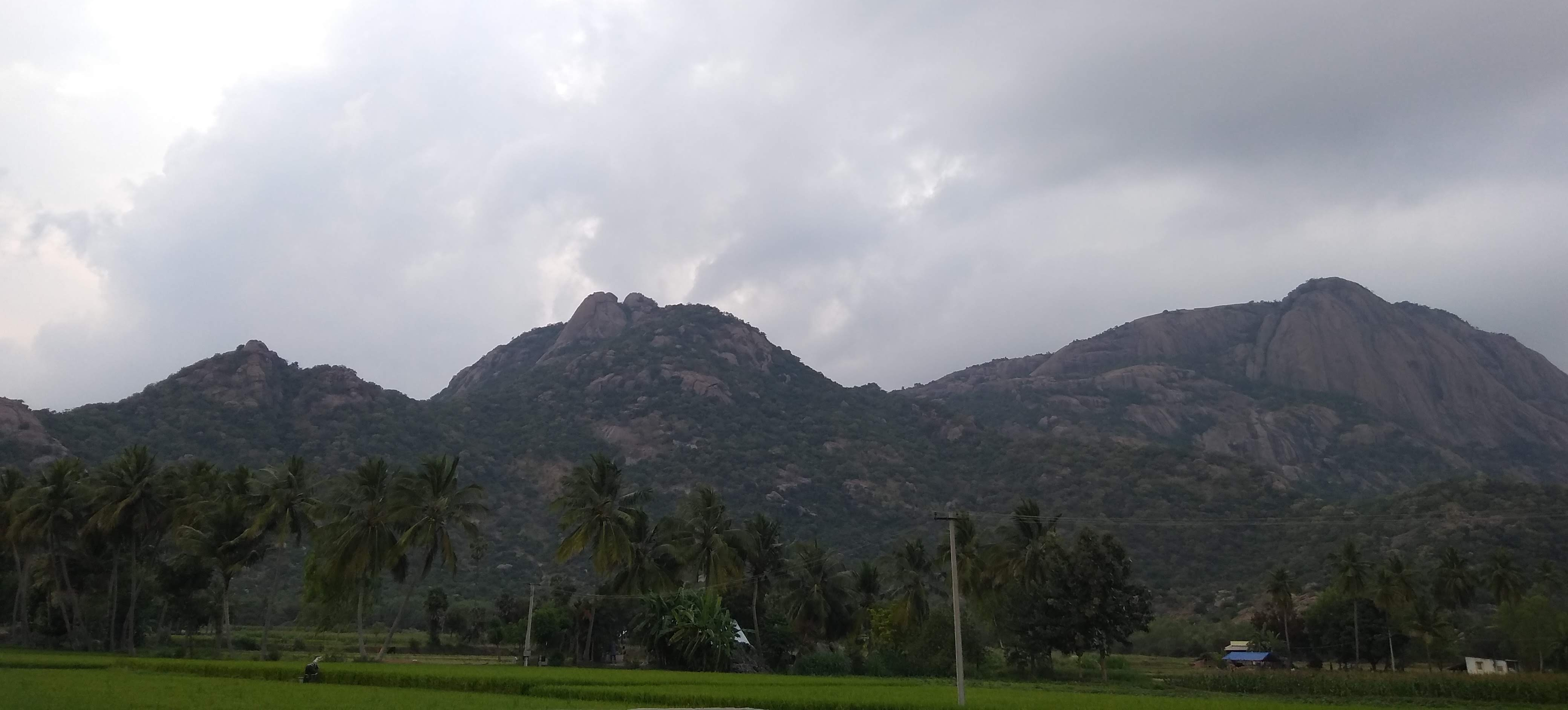 கல்வராயன் மலை, கள்ளக்குறிச்சி மாவட்டம், தமிழ்நாடு, இந்திய ஒன்றியம்.